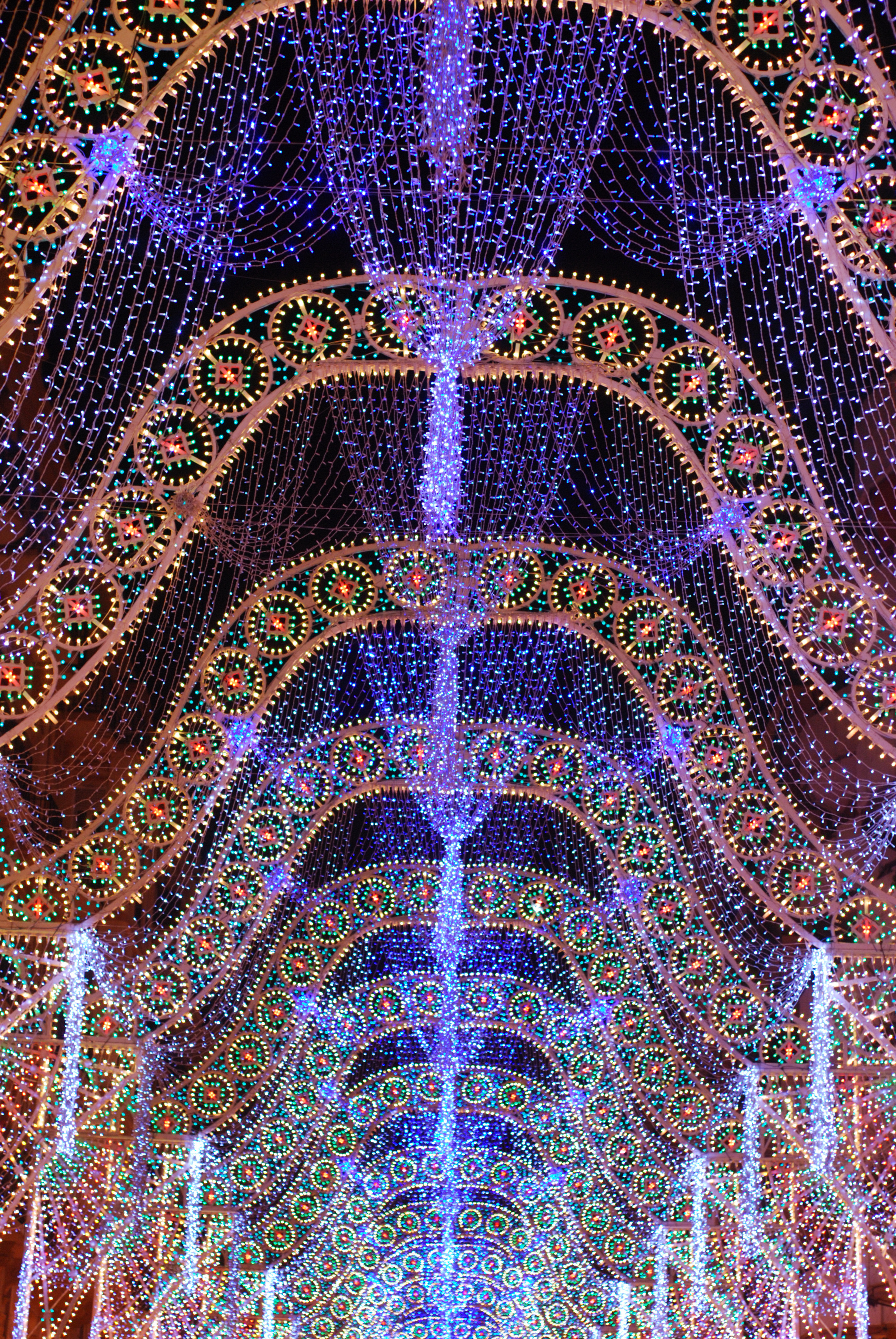 Carrer enllumenat de Sueca-Literat Azorín 2008, guanyadora del premi en 2008